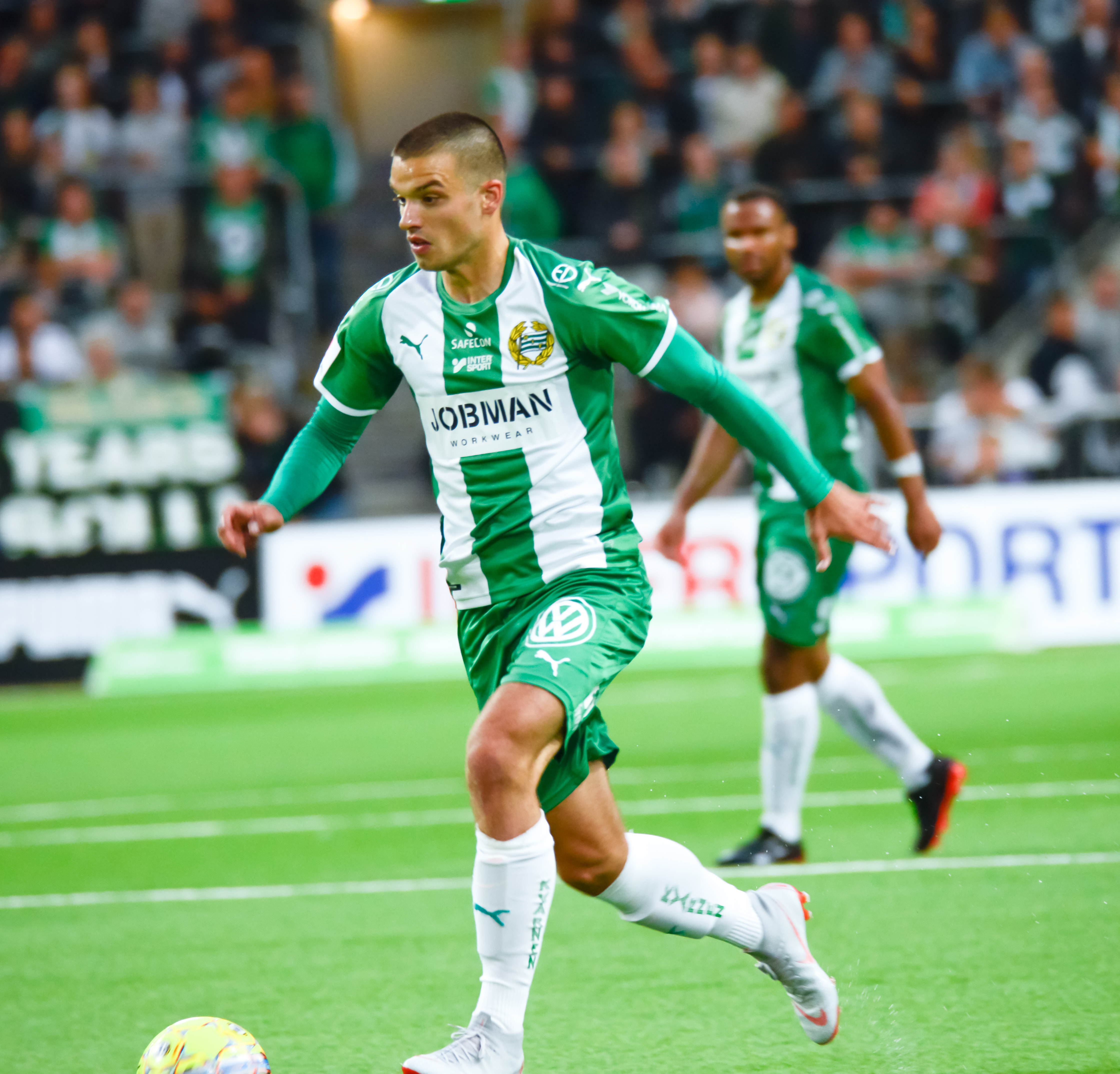 Hammarby-Örebro 2018-08-20. Vinst 2-0 till Bajen